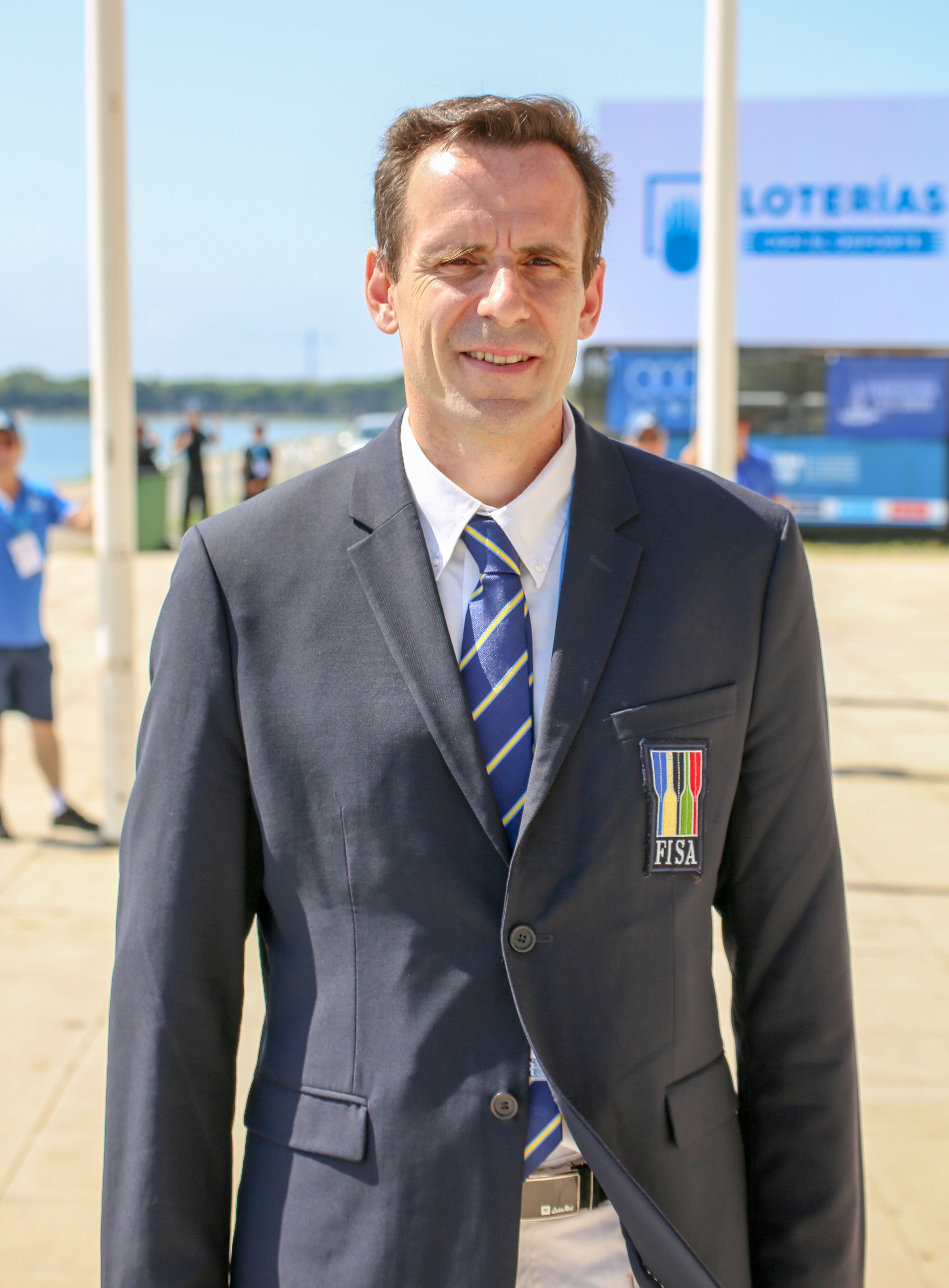 Jean-Christophe Rolland, presidente de la FISA